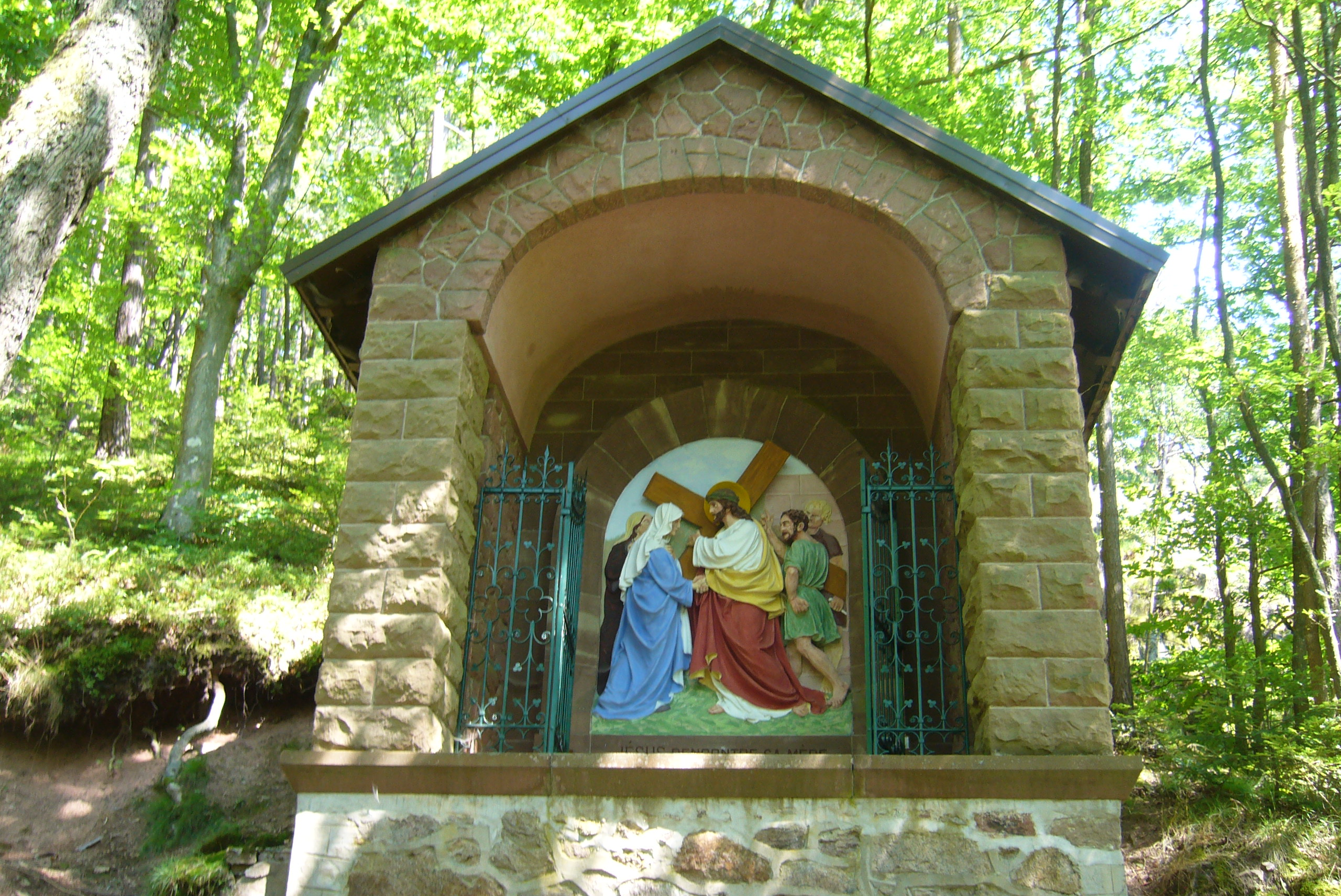 Dusenbach 005.JPG